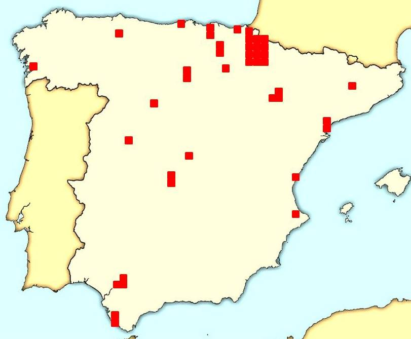 Mapa de los diputados tradicionalistas electos en 1933